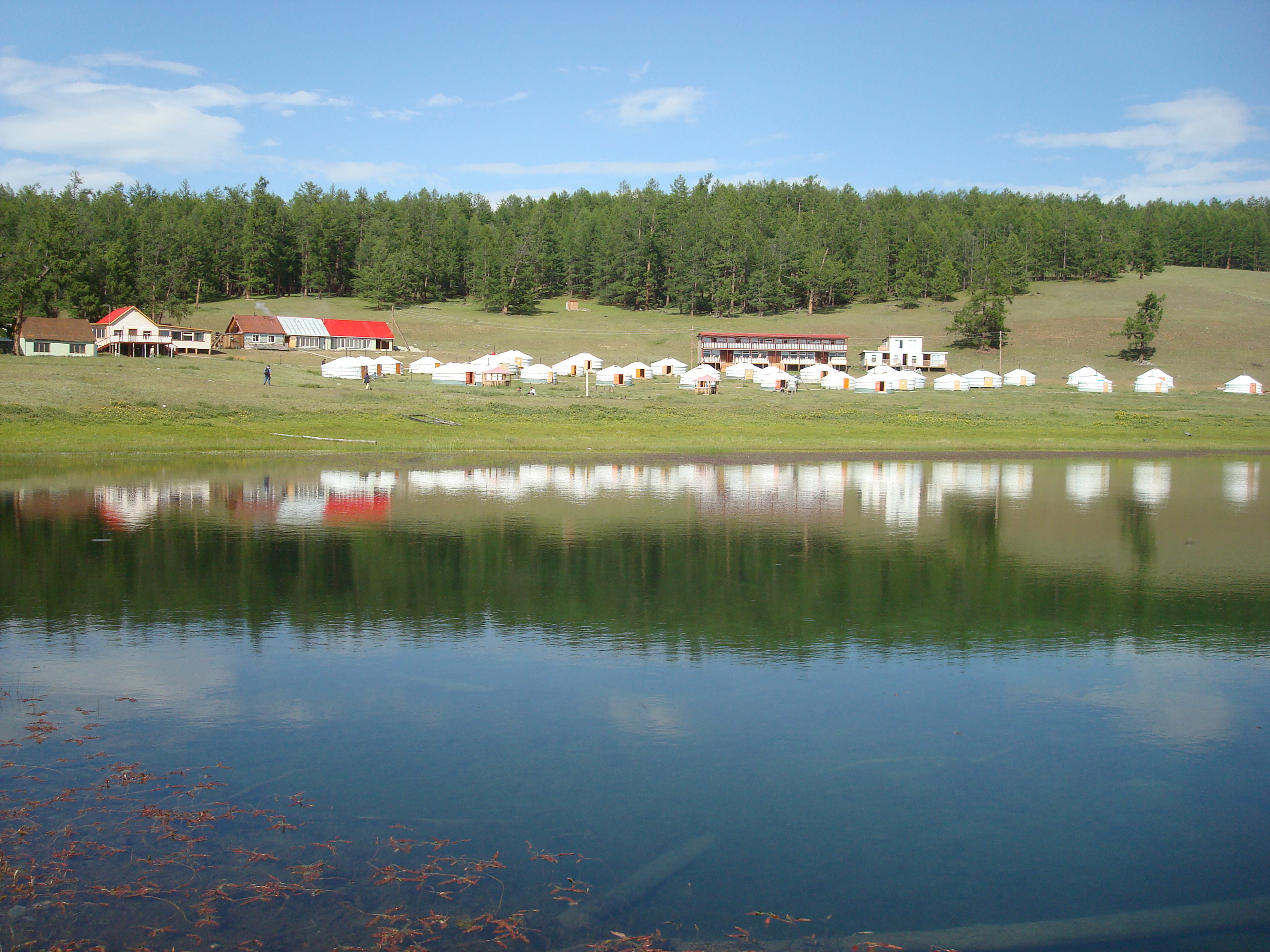 Am Chöwsgöl Nuur